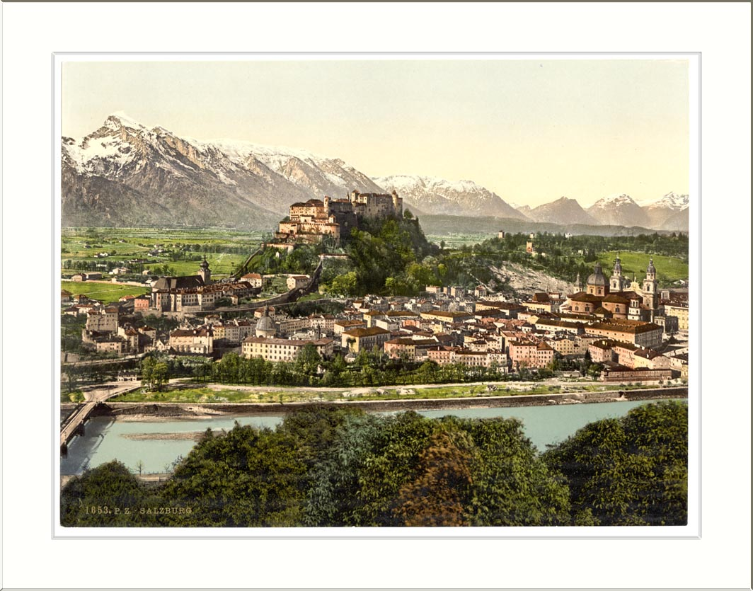 Salzburg from the Kapuzinerberg Austro-Hungary